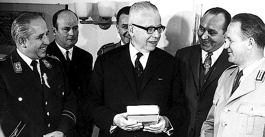 Am 14. November 1969 empfängt Bundespräsident Gustav Heinemann Bundesvorstandsmitglieder zu einem Gespräch. Hauptthema sind die Eingliederungsschwierigkeiten der ausscheidenden Zeitsoldaten in das zivile Berufsleben.